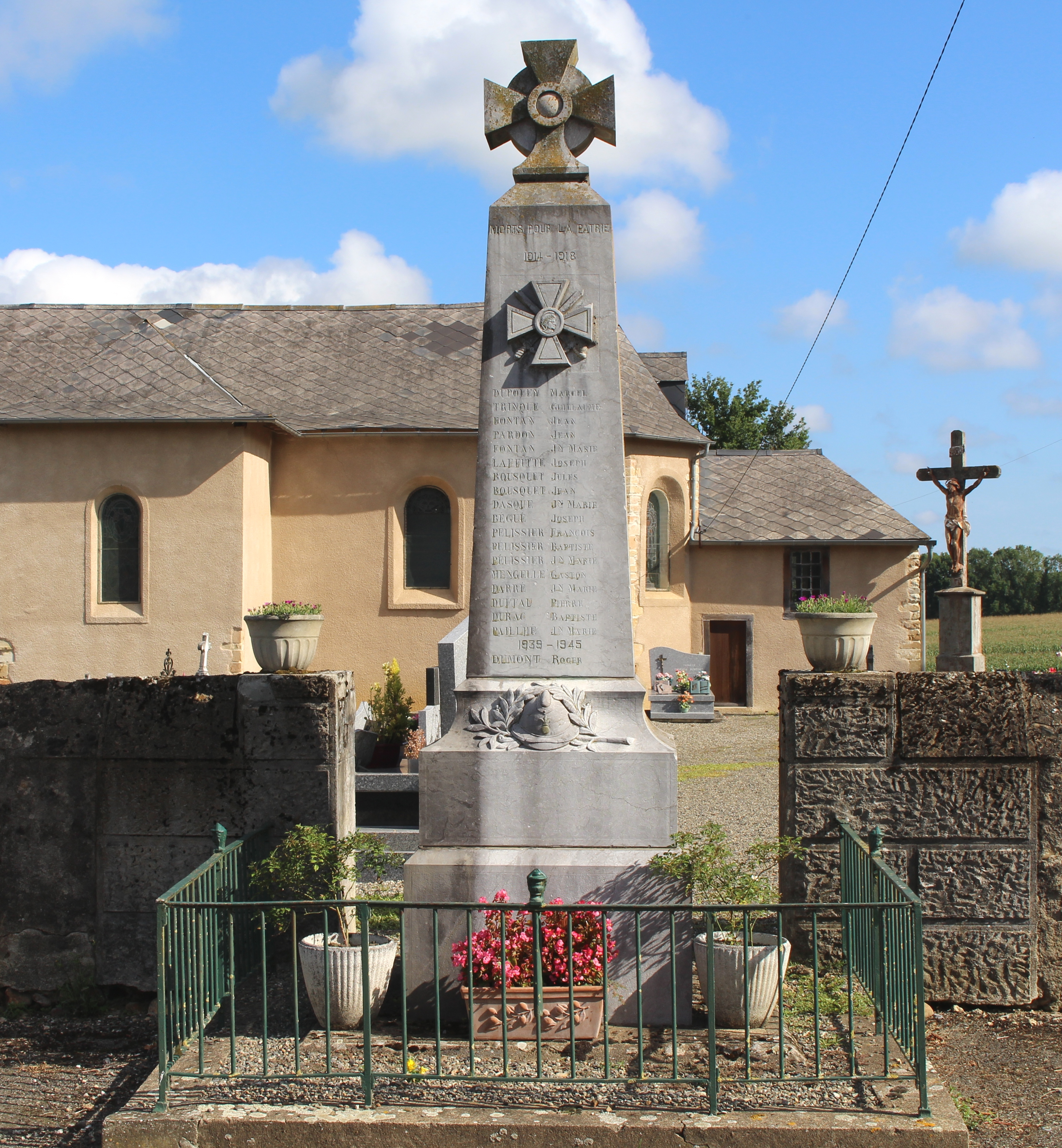 Monument aux morts de Clarac (Hautes-Pyrénées)